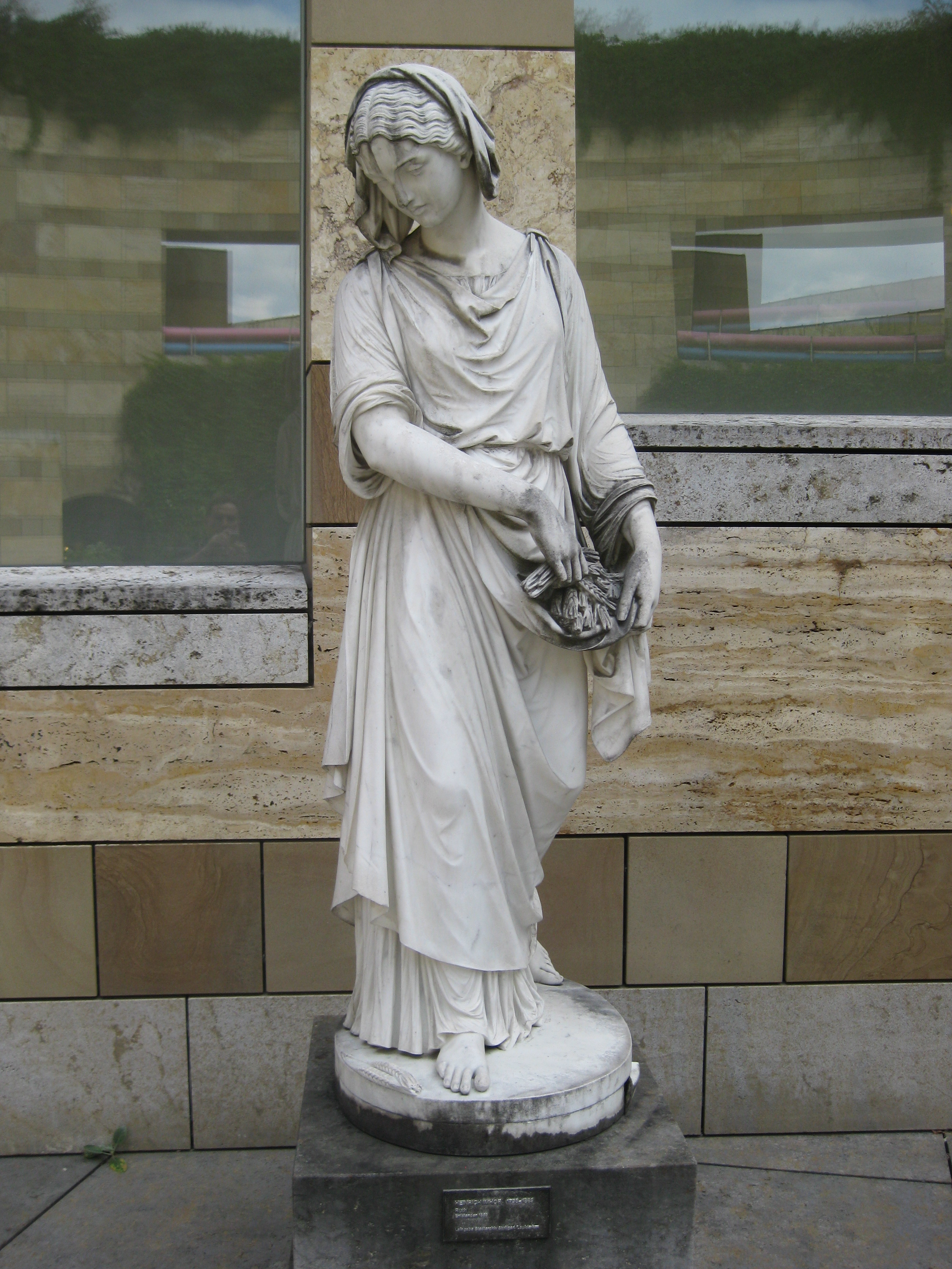 Heinrich Maximilian Imhof: Ruth oder Die Ährenleserin. Klassizistische Rundplastik der Moabiterin Ruth auf runder Plinthe, Marmor, quaderförmiger Steinsockel, lebensgroß, bezeichnet: „HEINR. IMHOF FEC. ROMA 1859“, Entstehungsjahr 1859, ursprünglich: Stuttgart, Villa Berg, unteres Vestibül, nach dem Zweiten Weltkrieg: Stuttgart, Städtisches Lapidarium, heute: Stuttgart, Staatsgalerie, Rotunde (als Leihgabe des Städtischen Lapidariums). Erhaltungszustand: gut, jedoch fehlt ein Glied an einem Finger, Absplitterung an der Plinthe, Schwärzungen. Die Moabiterin Ruth zog nach dem Tod ihres jüdischen Mannes aus Moab nach Israel und arbeitete dort als Ährenleserin bei einem Verwandten ihres Manns. Die Statue zeigt Ruth, wie sie Ähren sammelt und in einer Gewandfalte birgt. Ruth wird als junge Frau in antiken Kleidern und mit Kopftuch dargestellt. Den Blick wendet sie aufmerksam zum Boden, wo sie die aufzulesenden Ähren findet.